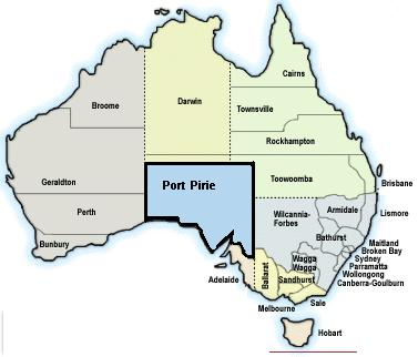 Eigenarbeit